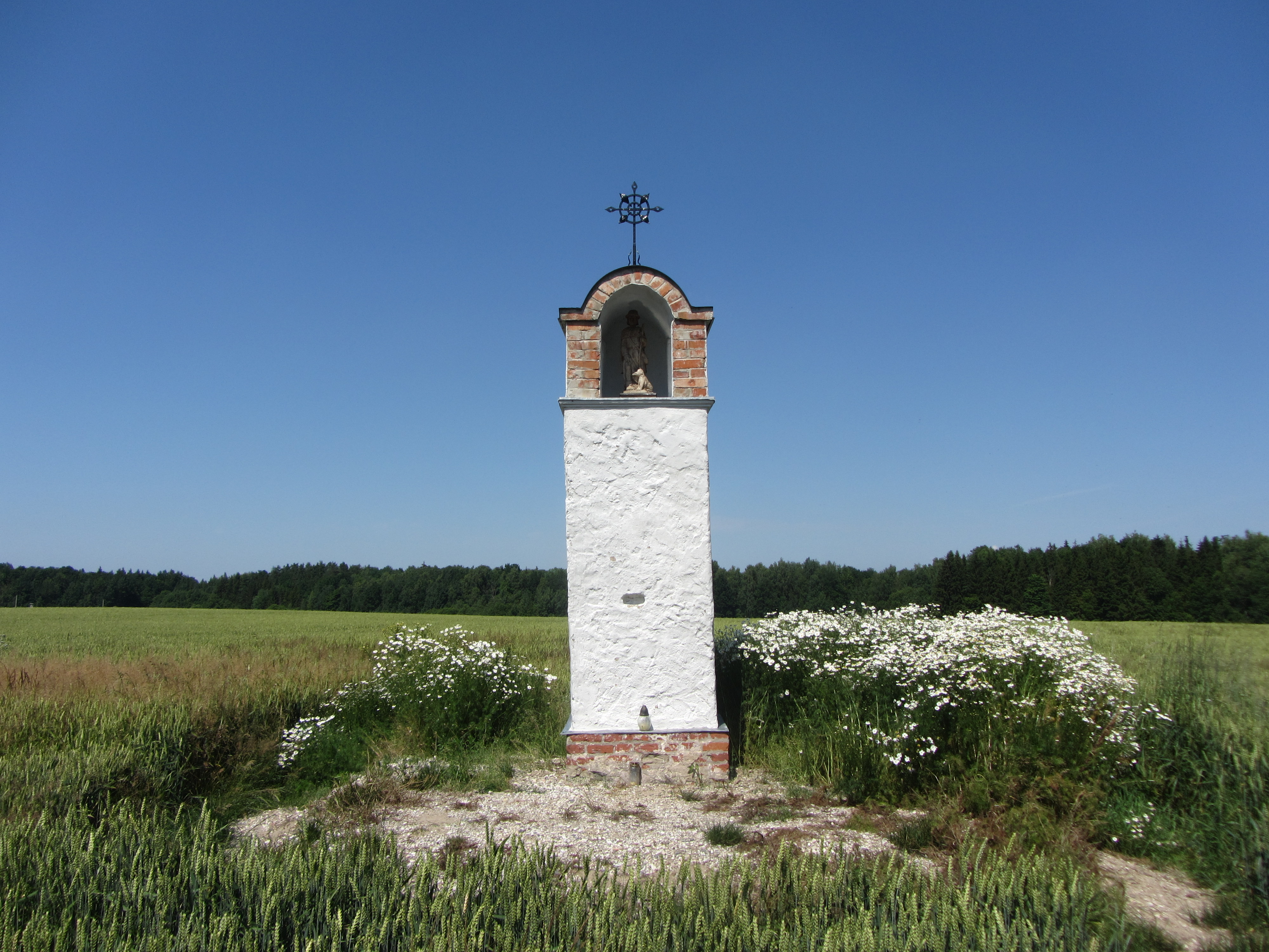 Lyduokių sen., Lithuania